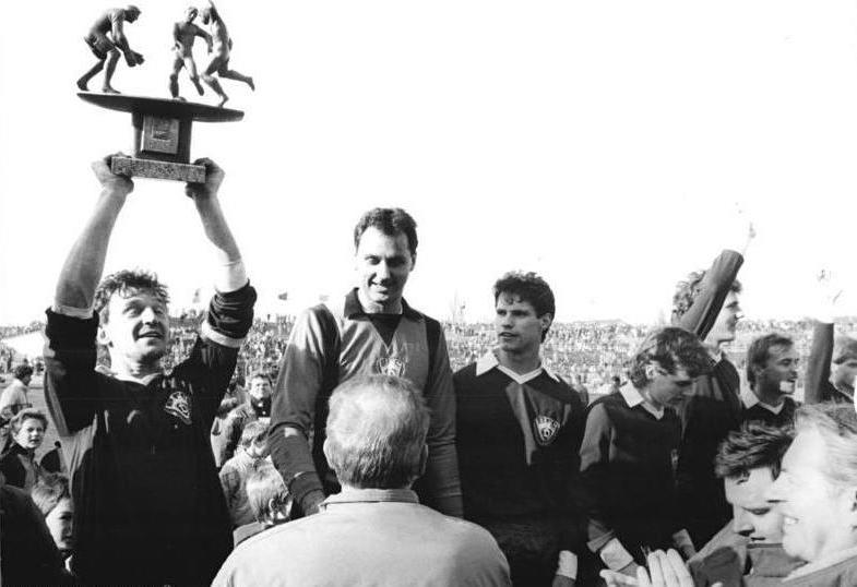 ADN-ZB-Settnik-1.4.89-fd-Berlin: BFC Dynamo gewinnt FDGB-Pokal- Zum drittenmal in seiner Klubgeschichte gewann der BFC Dynamo den FDGB-Pokal im Fußball. Nach dem verdienten Sieg über die Karl-Marx-Städter Auswahl nahm Mannschaftskapitän Frank Rohde den Pokal für das hauptstädtische Team entgegen.